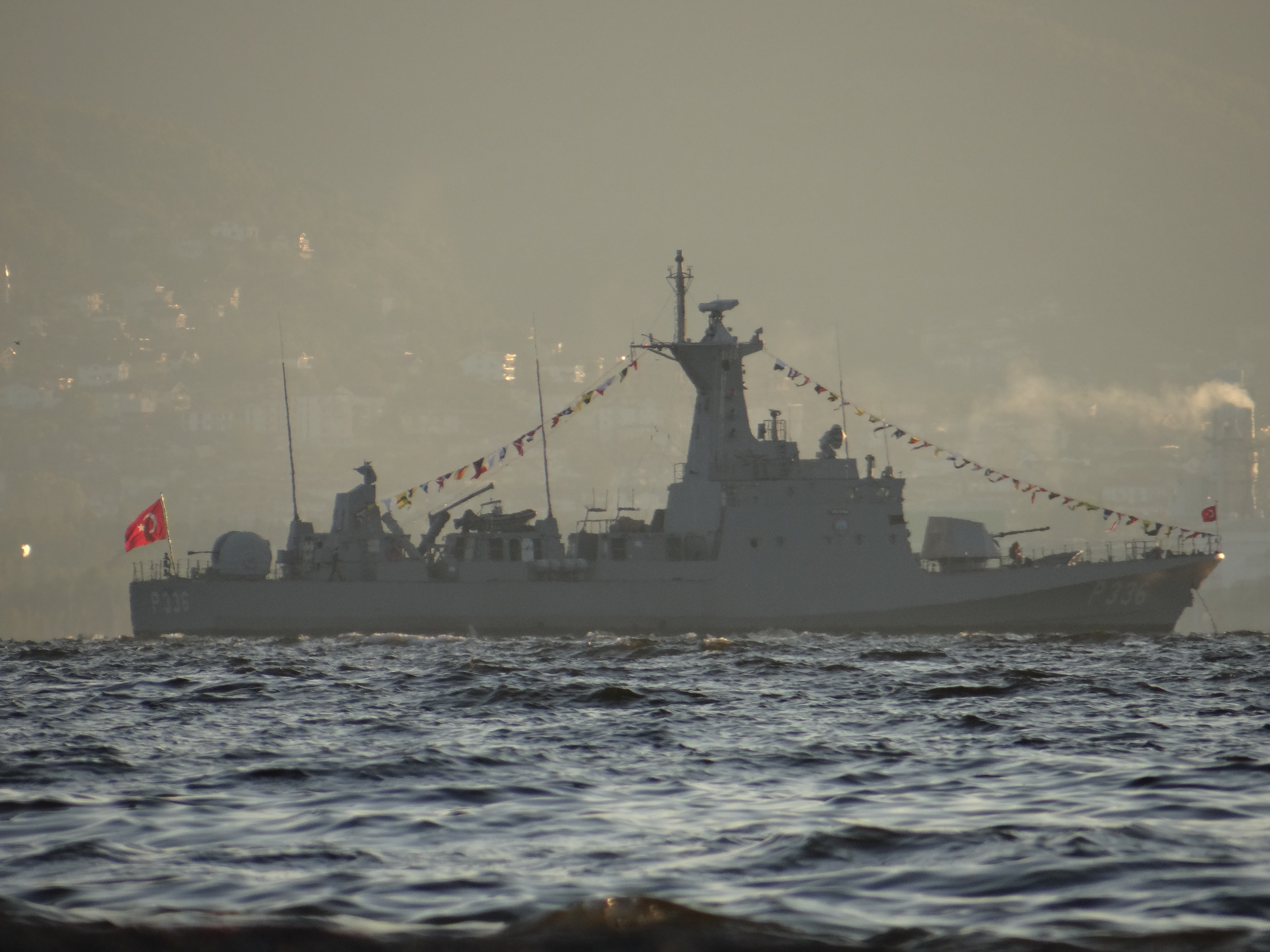 TCG P-336 Zıpkın 20171029